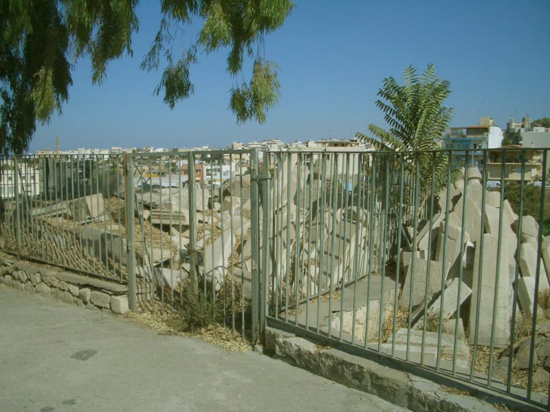 abgeräumte türkische Grabsteine, Hieraklion